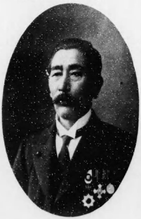 九代吉野周太郎（1851～1911）